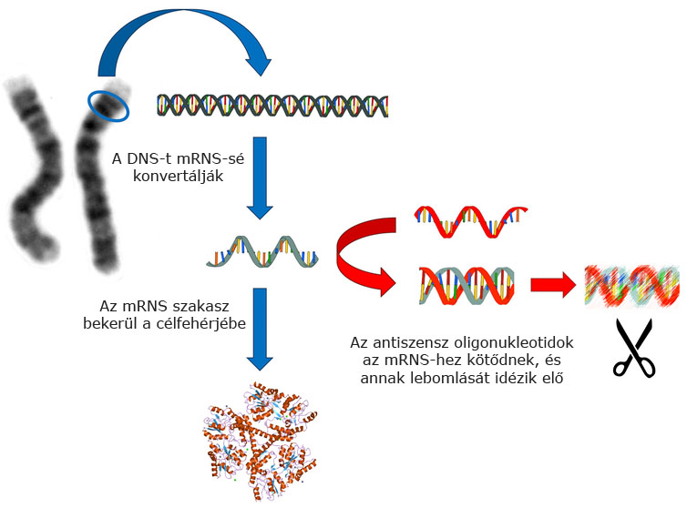 Folyamata - skicc